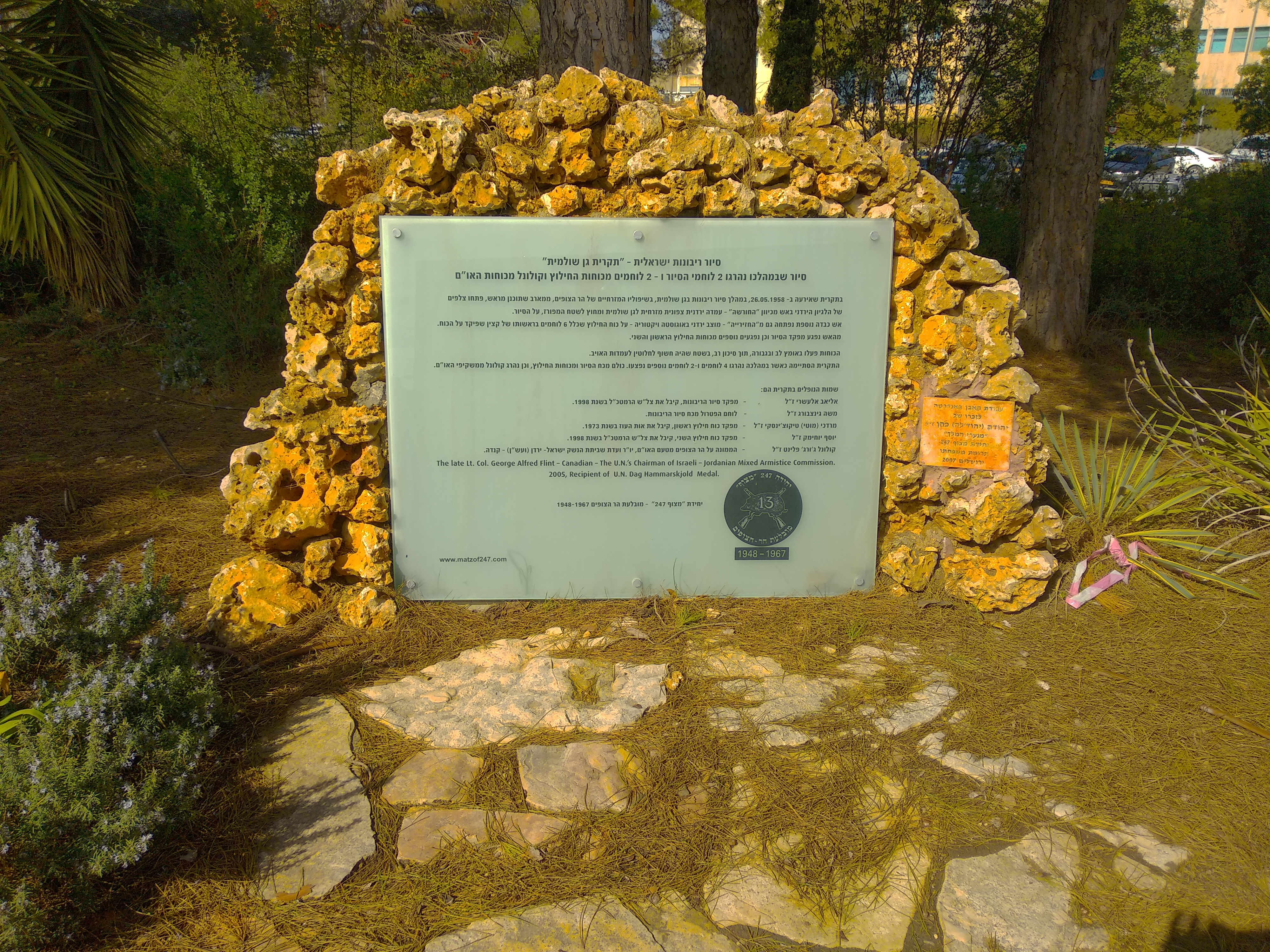 אנדרטה לזכר חללי תקרית גן שולמית בהר הצופים